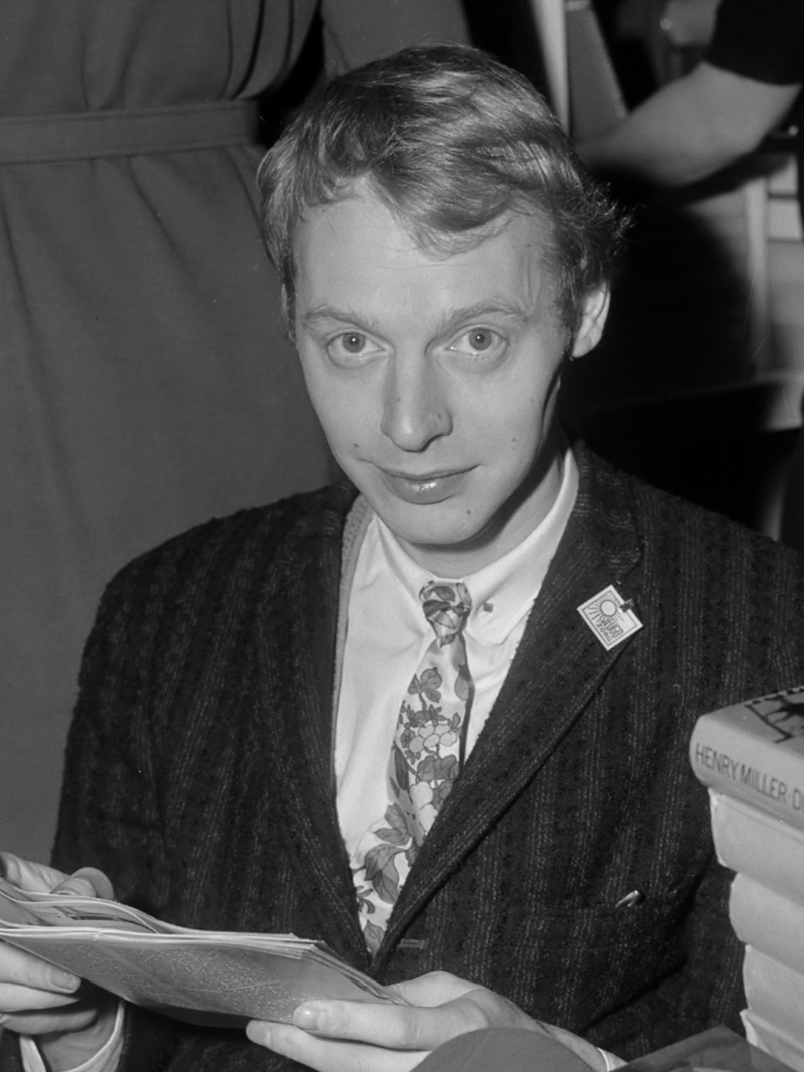 Boekenmarkt in de Bijenkorf te Amsterdam, Simon Vinkenoog bij boekenstal 2 april 1966